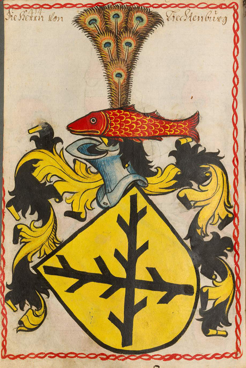 Scheibler'sches Wappenbuch , älterer Teil; Seite 414 Die Herrn von Liechtenburg (Böhmen)